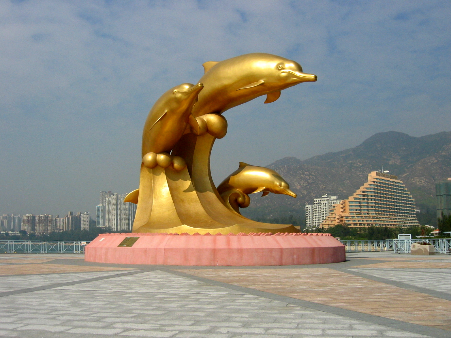 HK Golden Beach Dolphin Plaza